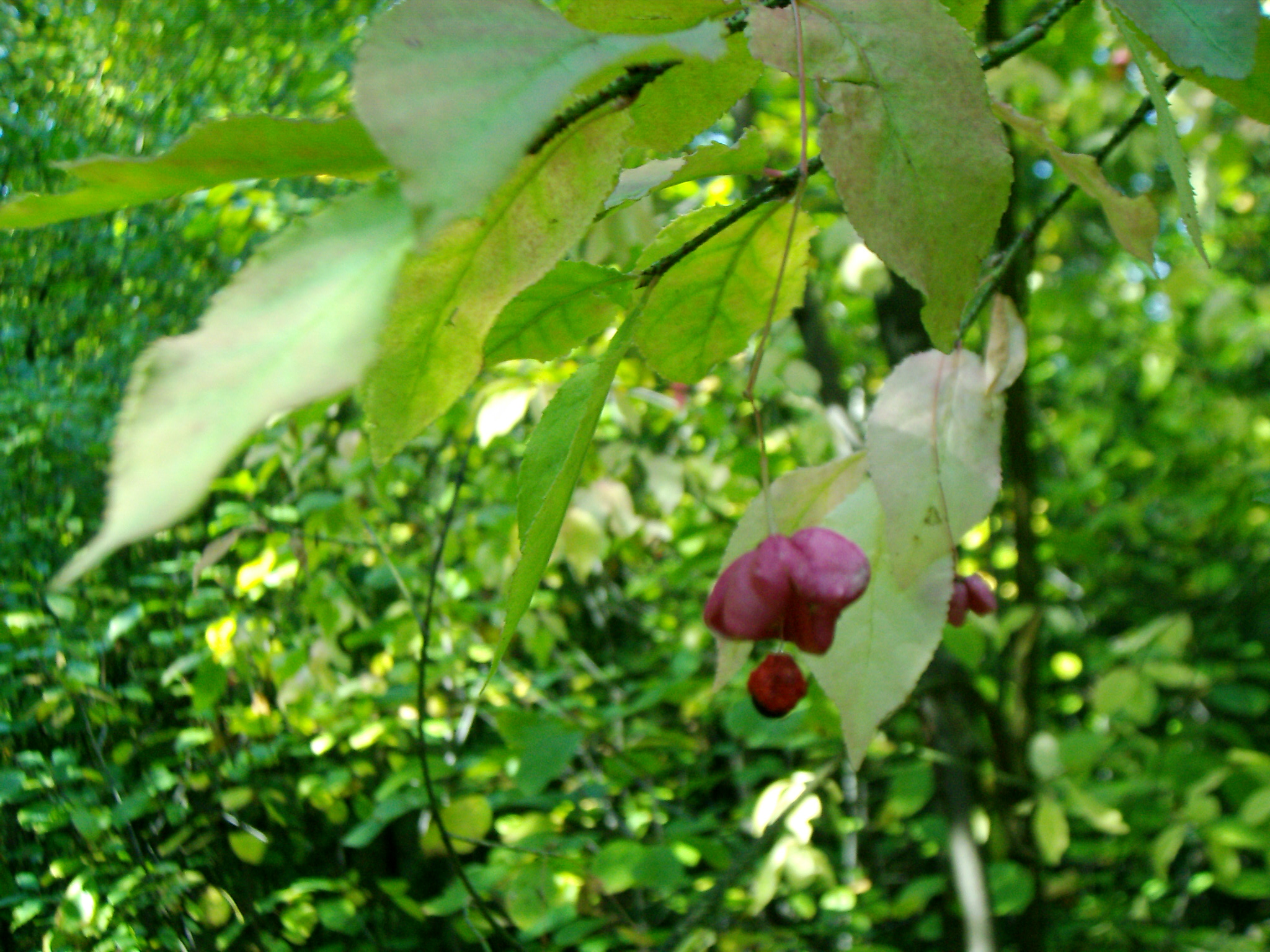 Euonymus verrucosa